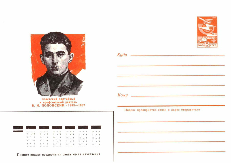 Художественные маркированные конверты 1984 года.